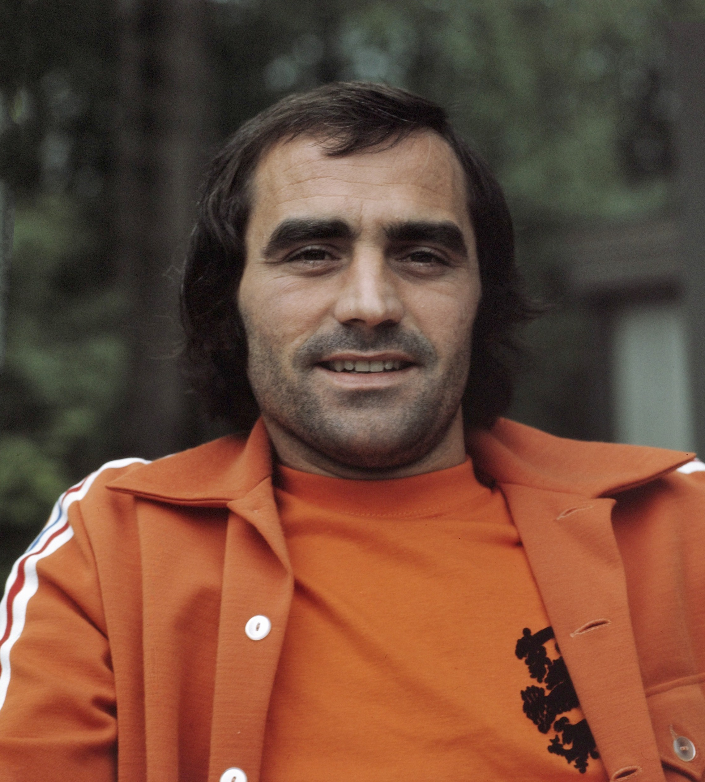 Pleun Strik